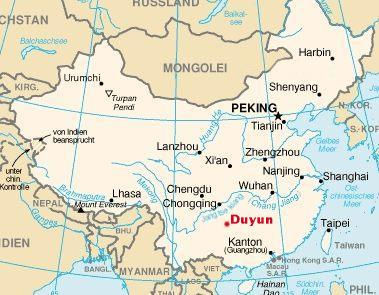 Lage der Stadt Duyun Als Bild wurde von Bild:Changchun Lage.jpg genommen und der Punkt versetzt.